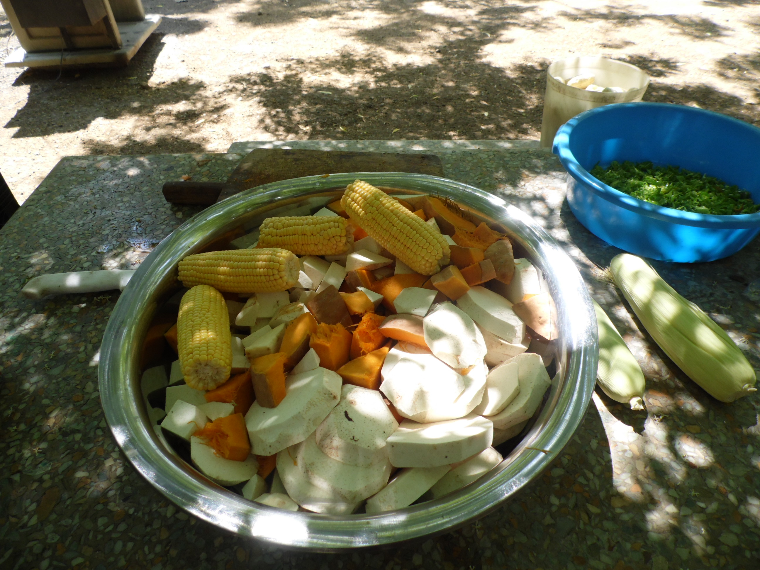 Ingredientes fundamentales para preparar una de las sopas mas características del oriente venezolano, la sopa de gallina, estos son: auyama, ocumo chino, ñame, maíz o mazorca; solo los fundamentales, ya que faltan mucho mas para lograr una buena sopa